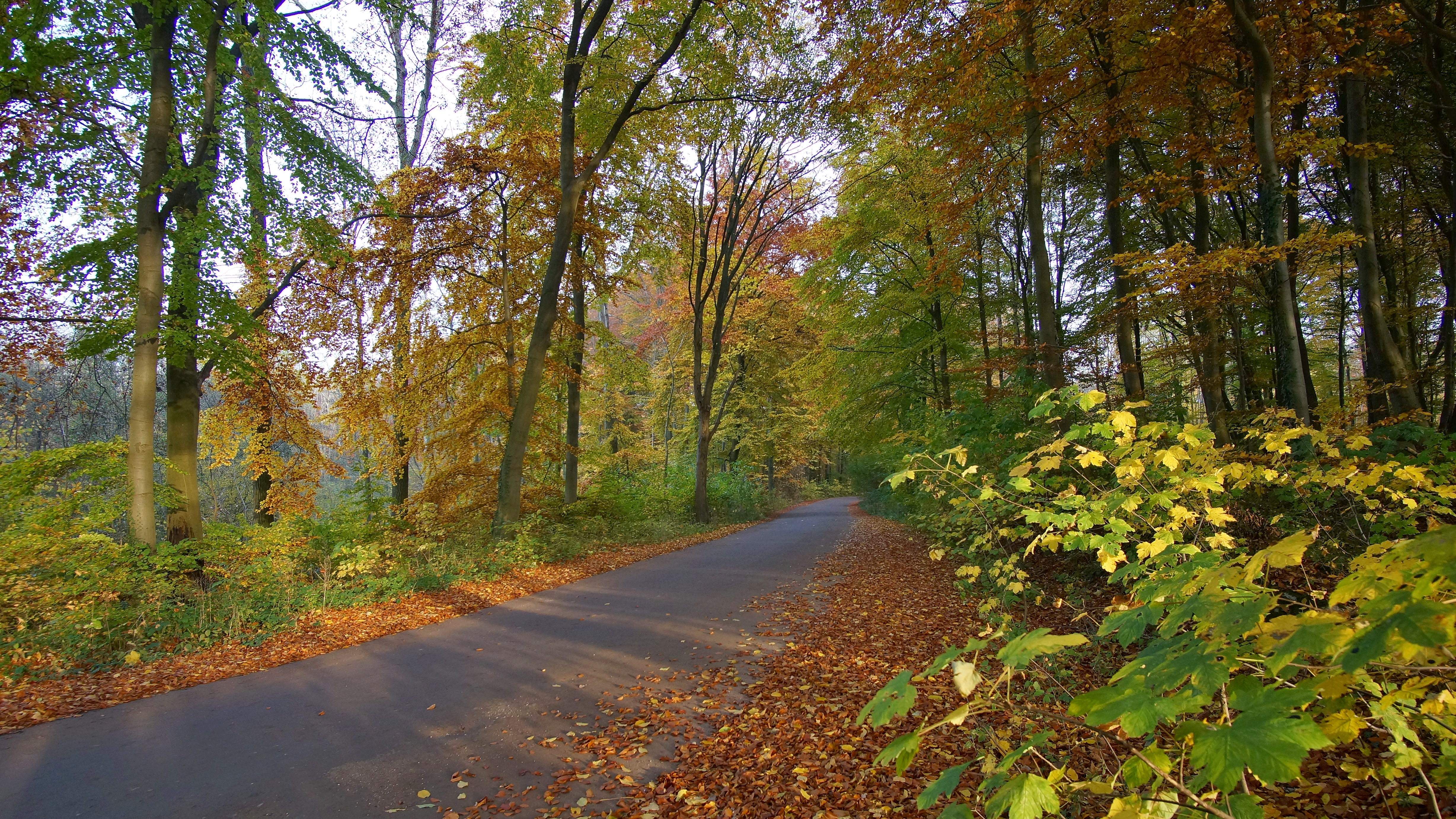 Lenorenwald an der Straße von Kalkhorst